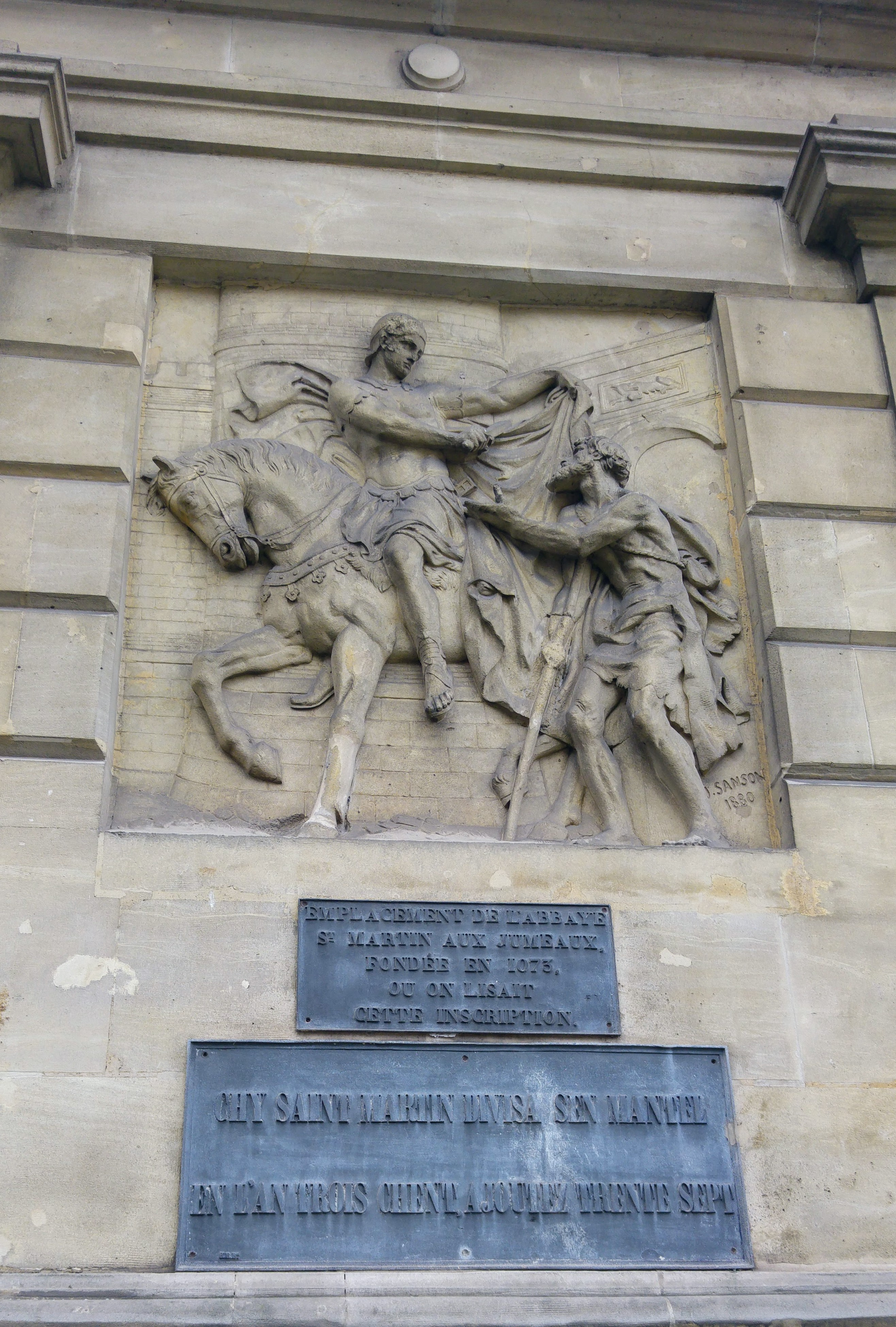 Représentation de saint Martin partageant son manteau avec un mendiant à Amiens en 334 visible sur le palais de justice de ladite ville.